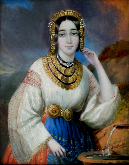 Maria Bibescu (n. Marițica Văcărescu), soția domnitorului Gheorghe Bibescu, Biblioteca Academiei Romane, Cabinetul de Stampe